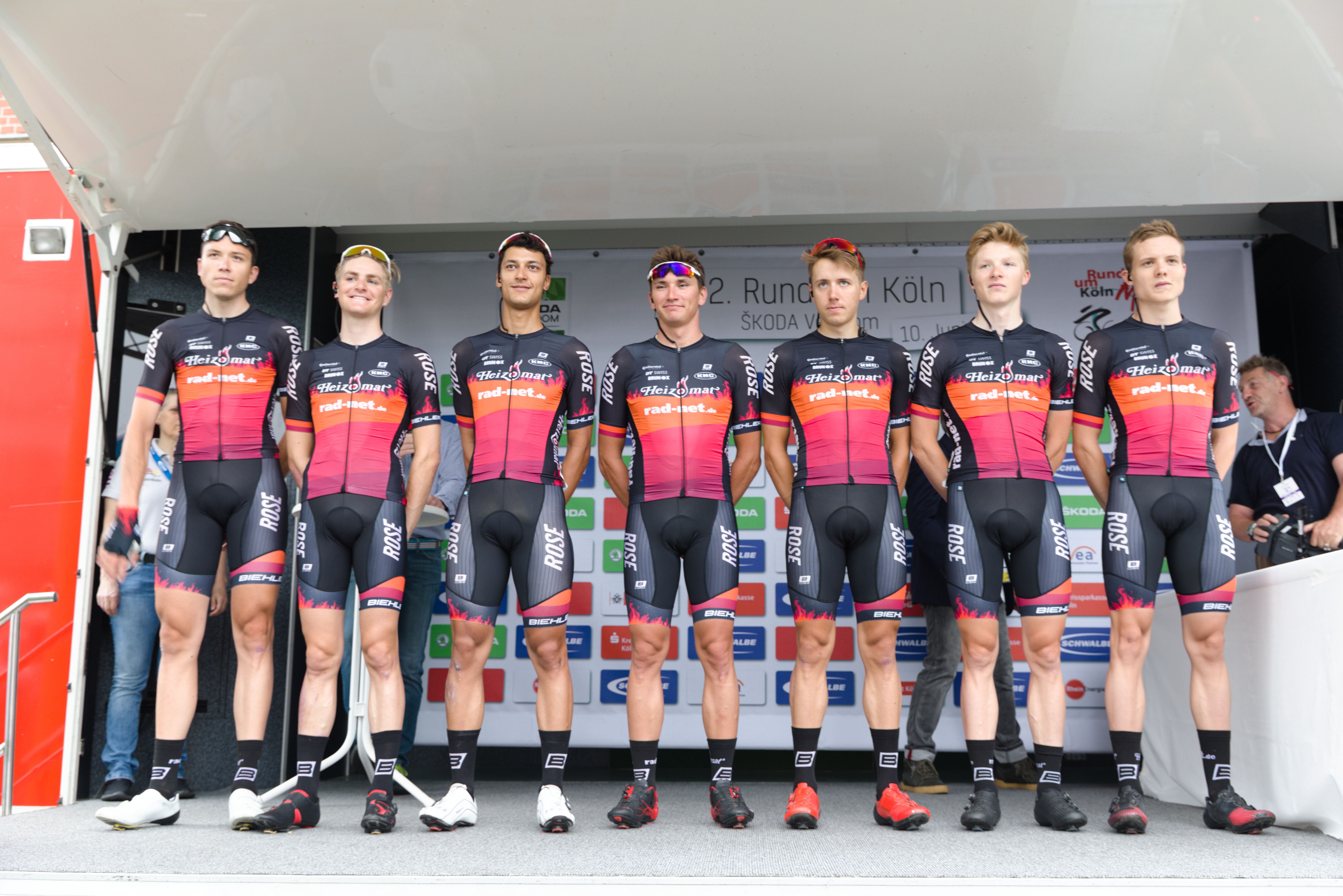 HEIZOMAT - RAD-NET.DE